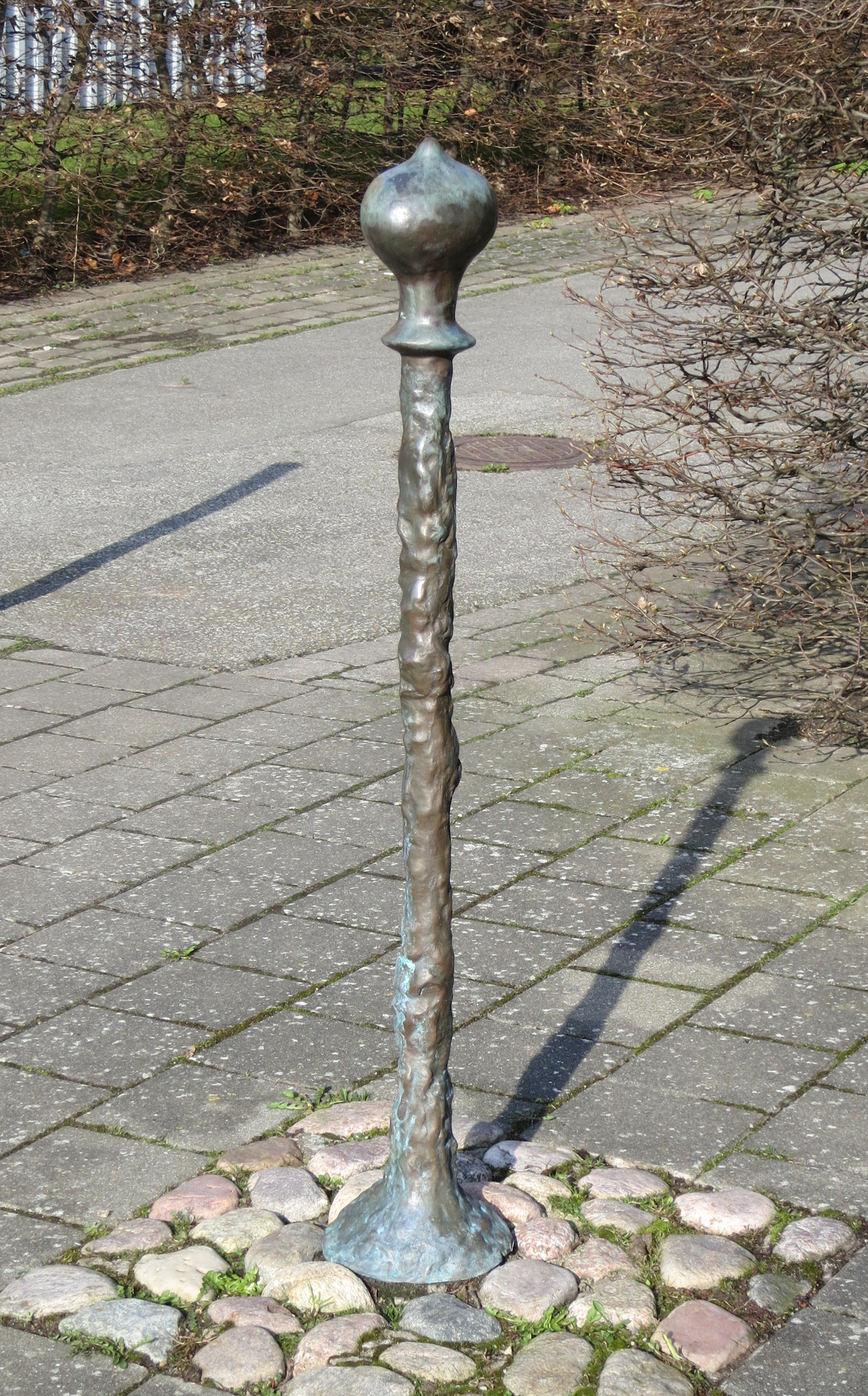 Spiran av Annika Svenbro, skulptur i Malmö